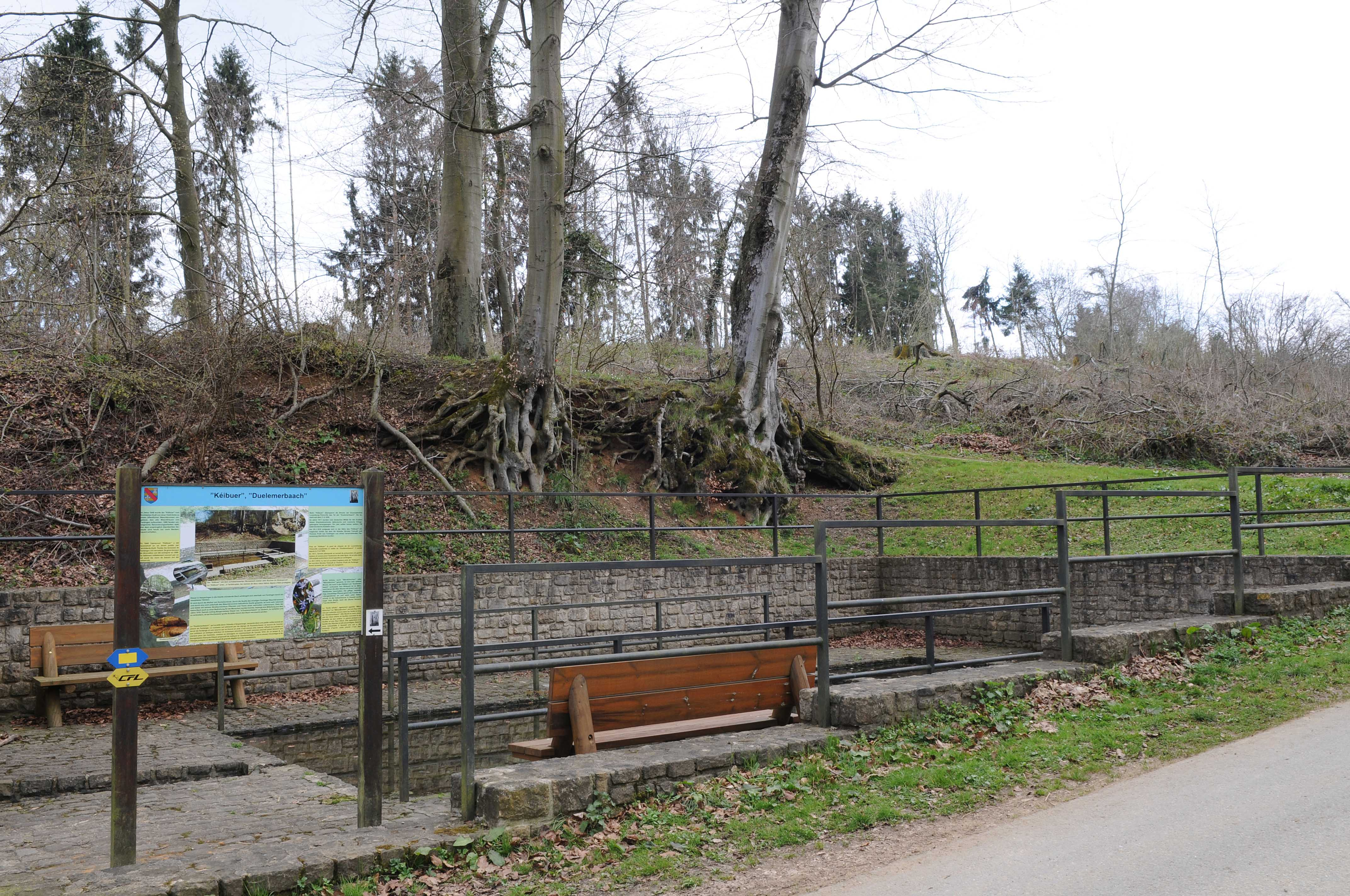 Kéibuer zu Hesper.